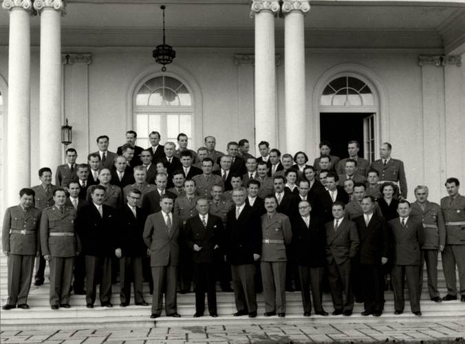 Tito sa narodnim herojima iz Srbije i Makedonije